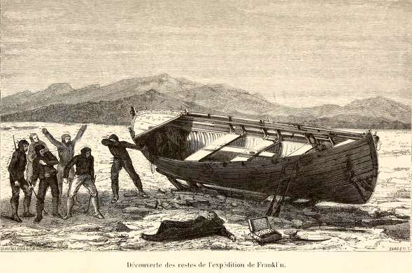 Arthur Mangin, Voyages et Découvertes outre-mer au XIXe siècle, illustrations par Durand-Brager, 1863 ː Découverte des restes de l'expédition Franklin.